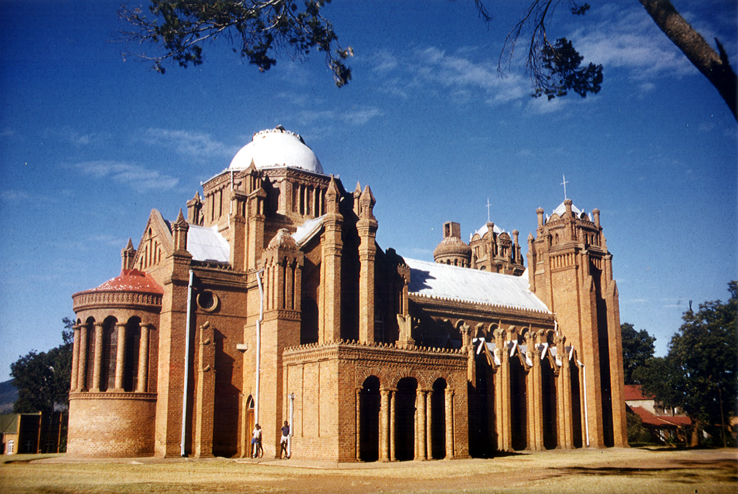 All Angel Kathedrale in Blantyre in Malawi in Afrika